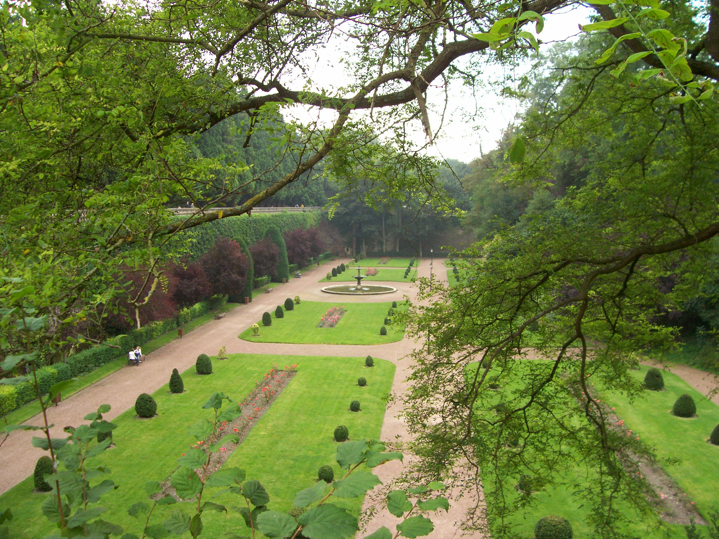 France, Pas-de-Calais. Espace-vert de la ville de Saint-Omer, au pied des anciens remparts de Vauban. Vue sur le jardin à la française.